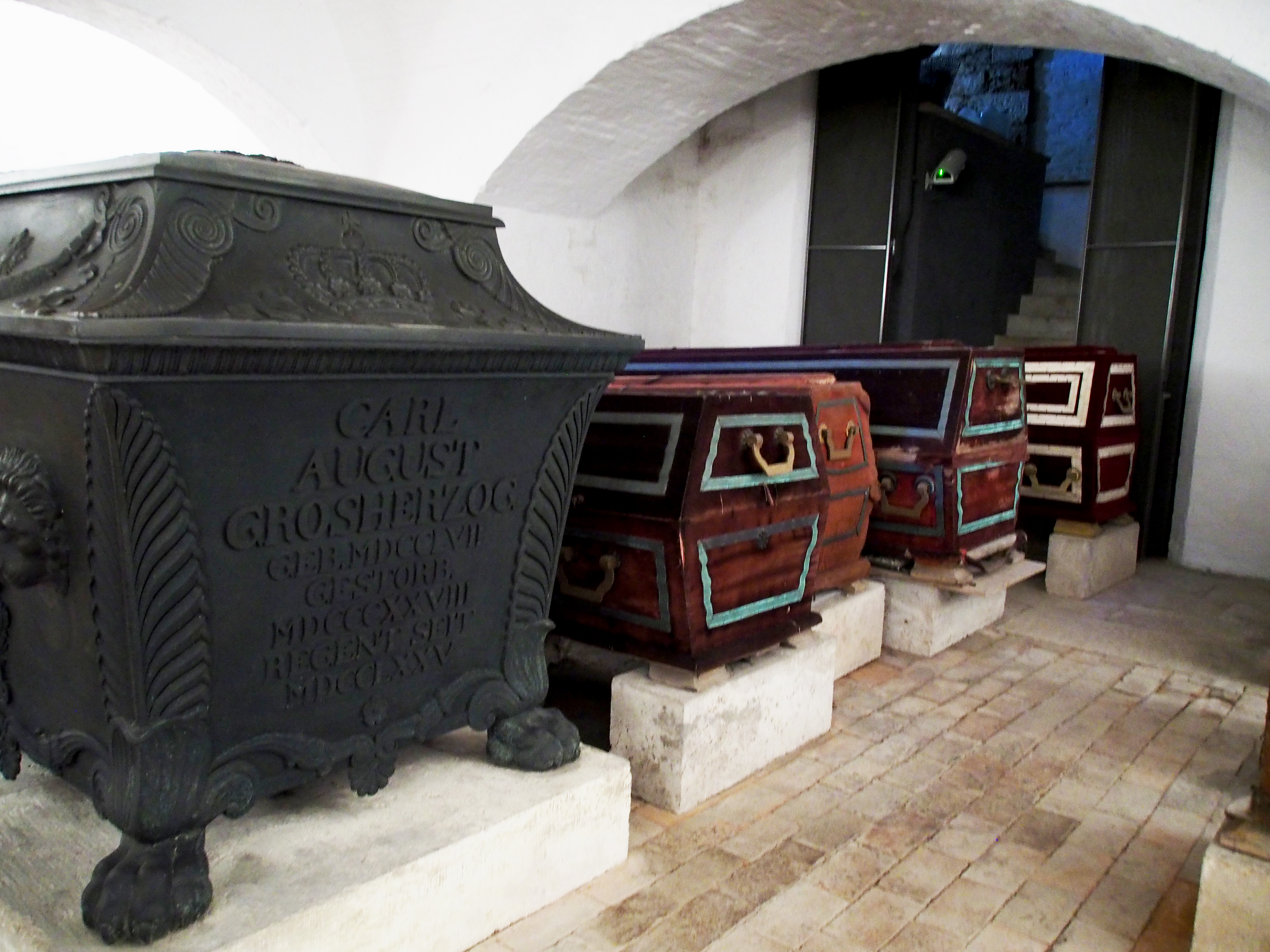 Sarg des Großherzogs Carl August von Sachsen-Weimar und Eisenach (vorne) und der Großherzogin Maria Pawlowna (hinten) in der Fürstengruft auf dem Historischen Friedhof (Weimar); dazwischen die Särge der Großherzogin Louisa (1757–1830), Prinzessin Anna Sophia (1851–1859) und von Großherzog Carl Friedrich (1783–1853)